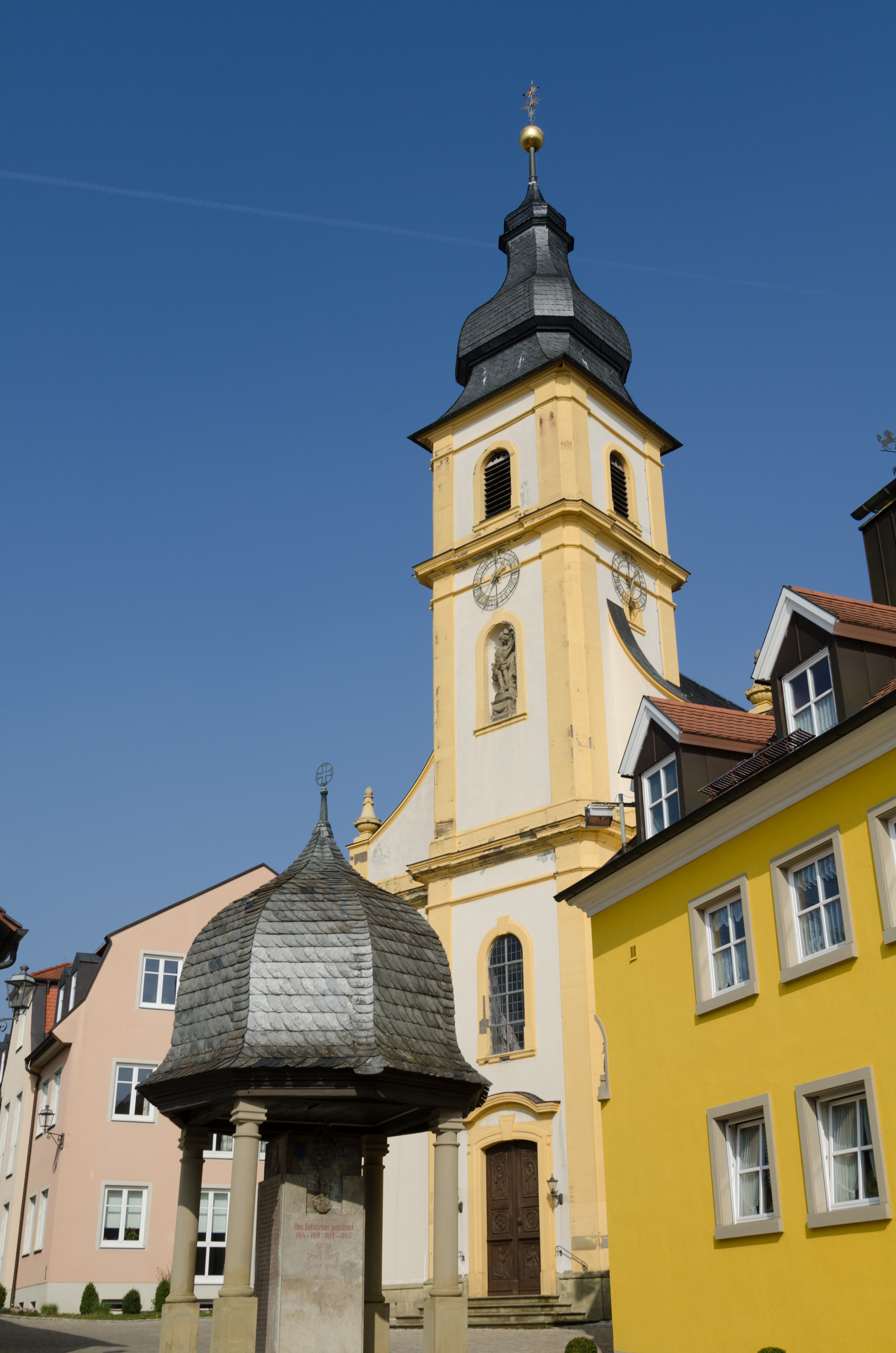 Katholische Pfarrkirche St. Sebastian in Unterspiesheim